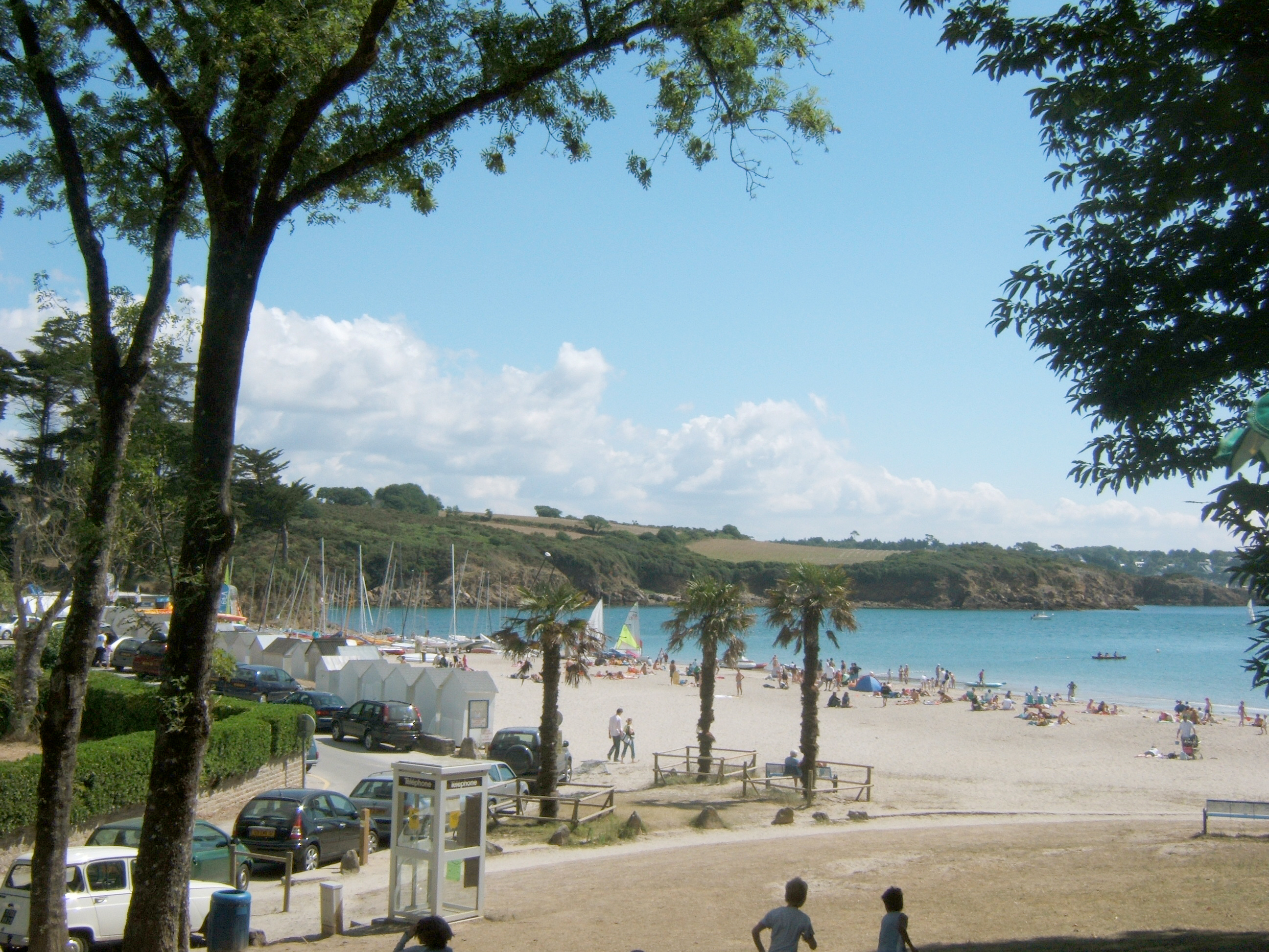 La plage de Port-Manech à Lann-Benaven, à l'ouest de l'embouchure de l'Aven dans le Finistère Sud.